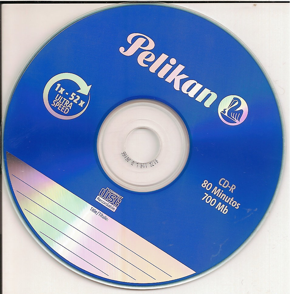 Disco compacto 80 minutos y 700Mb disco compacto ROM